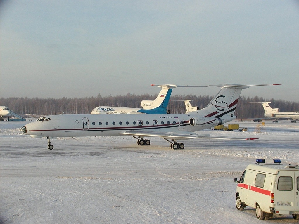 RusAir Tupolev Tu-134